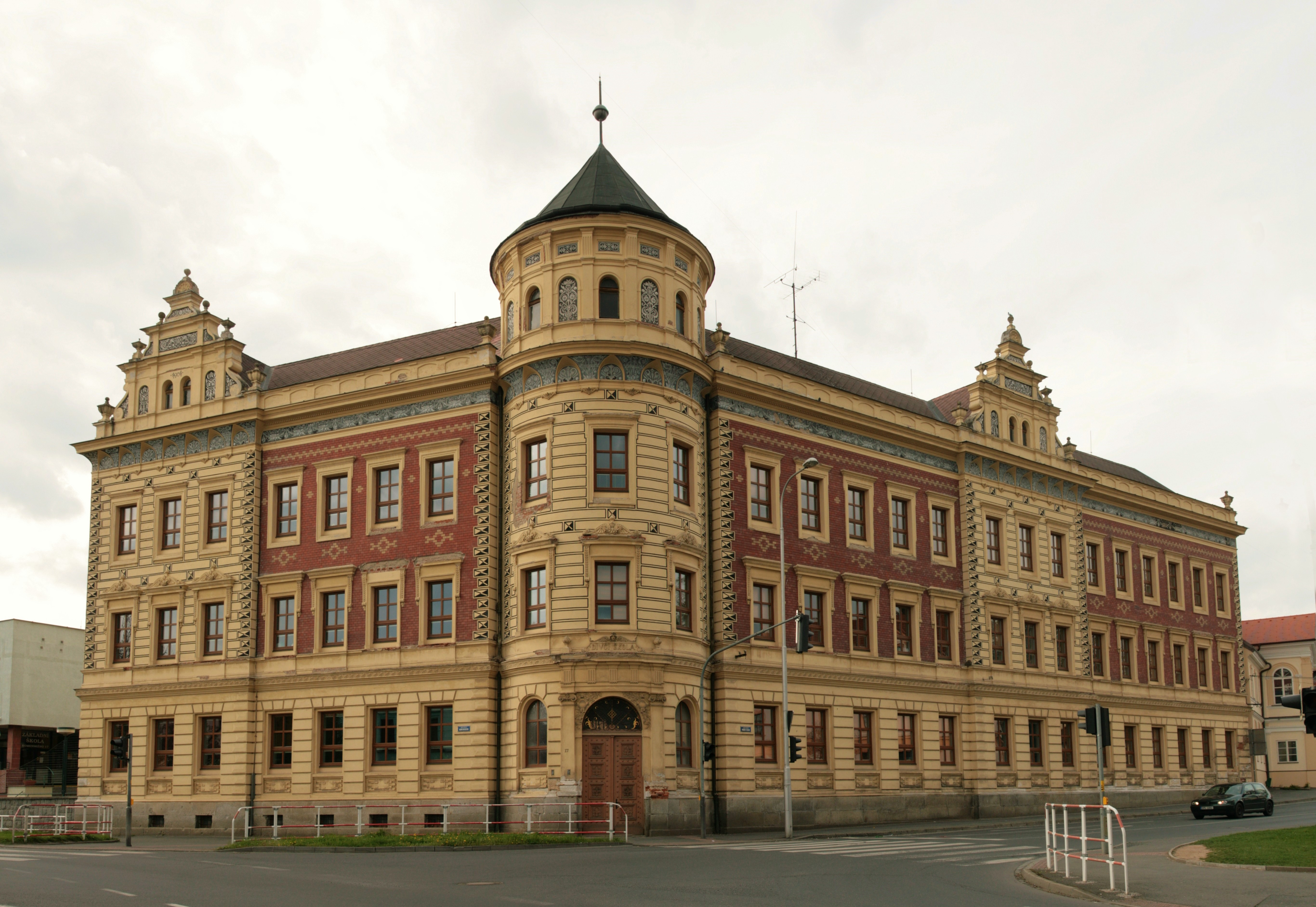 Město Domažlice. Budova základní školy čp. 17 na rohu ulic Komenského a Prokopa Velikého.